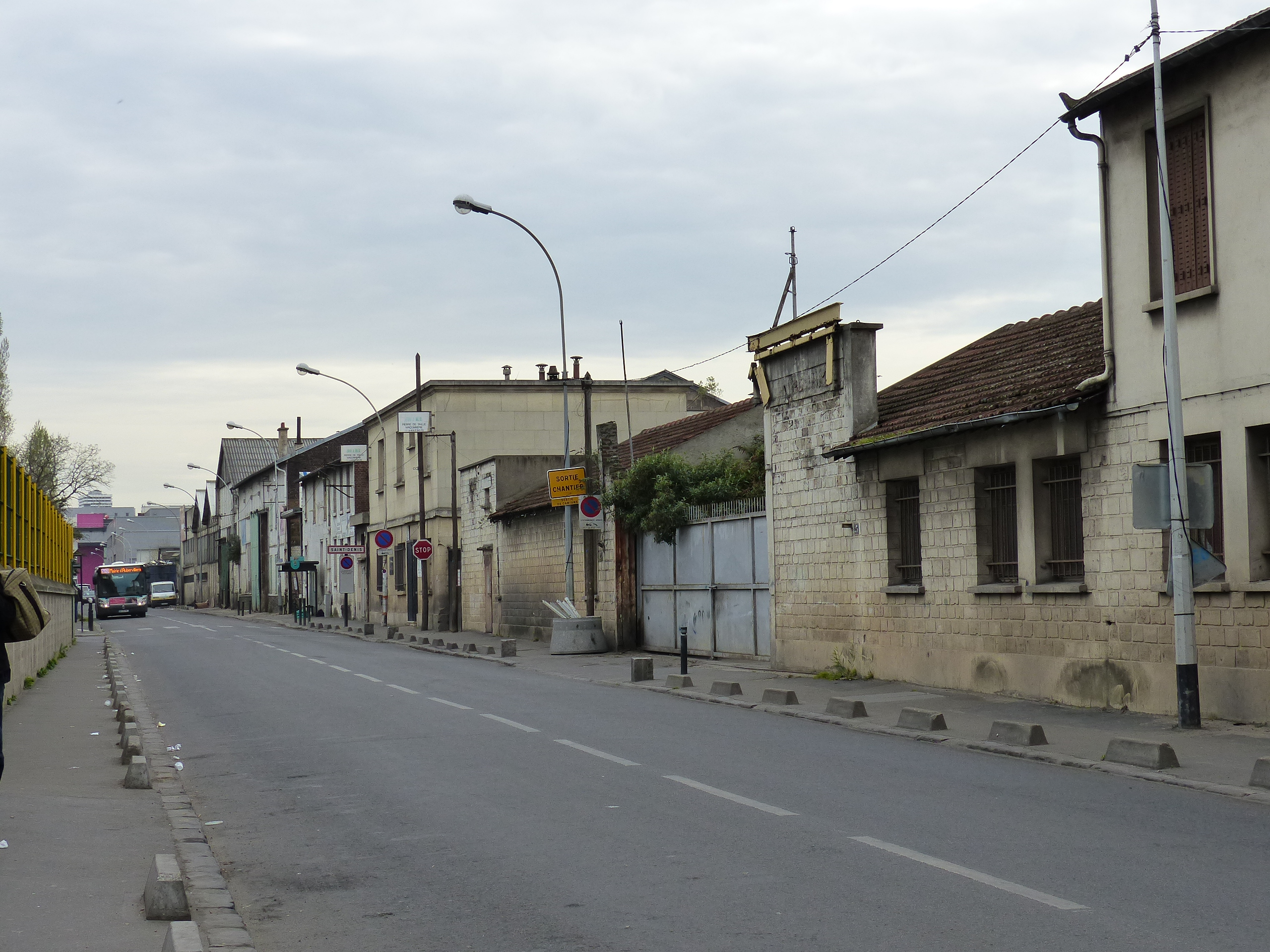 Saint-Denis (93) : Rue des Fillettes